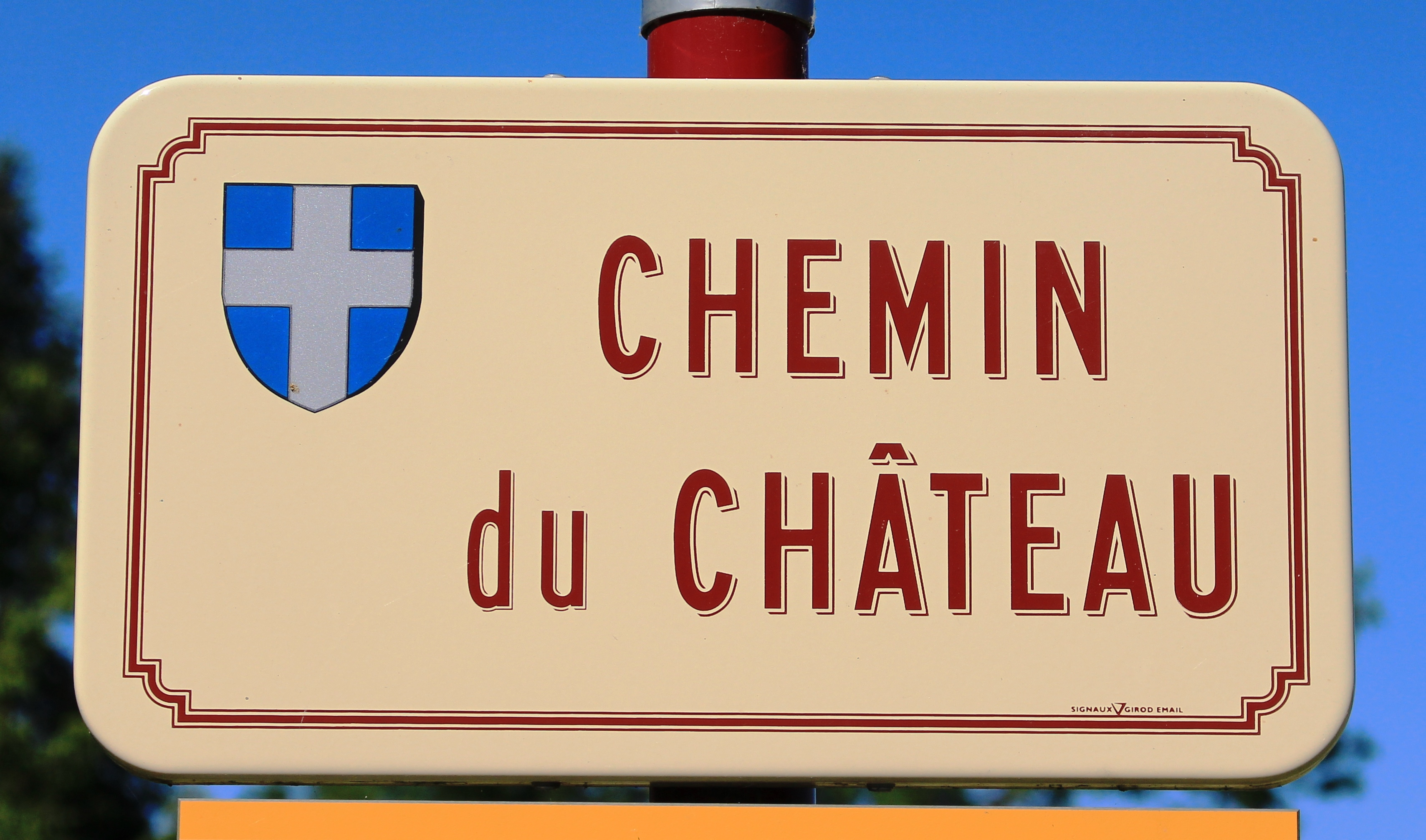 Rue du village de Castelbajac (Hautes-Pyrénées)